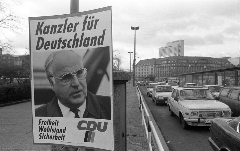 30.11.1990 Wahlwerbung der Parteien für die Wahl zum ersten gesamtdeutschen Bundestag in Leipzig.